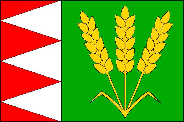 vlajka obce Bílsko